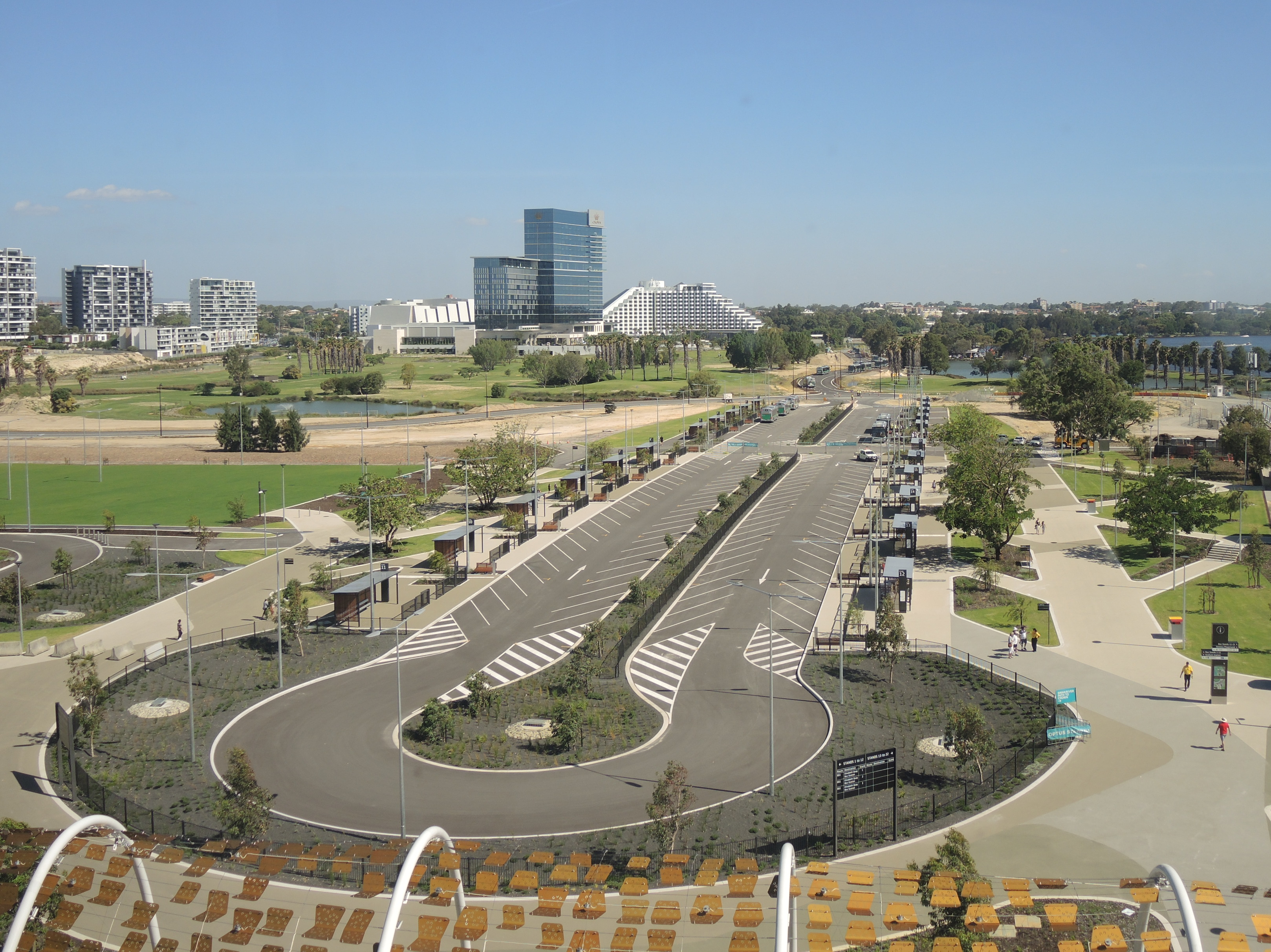 Perth Stadium open day.